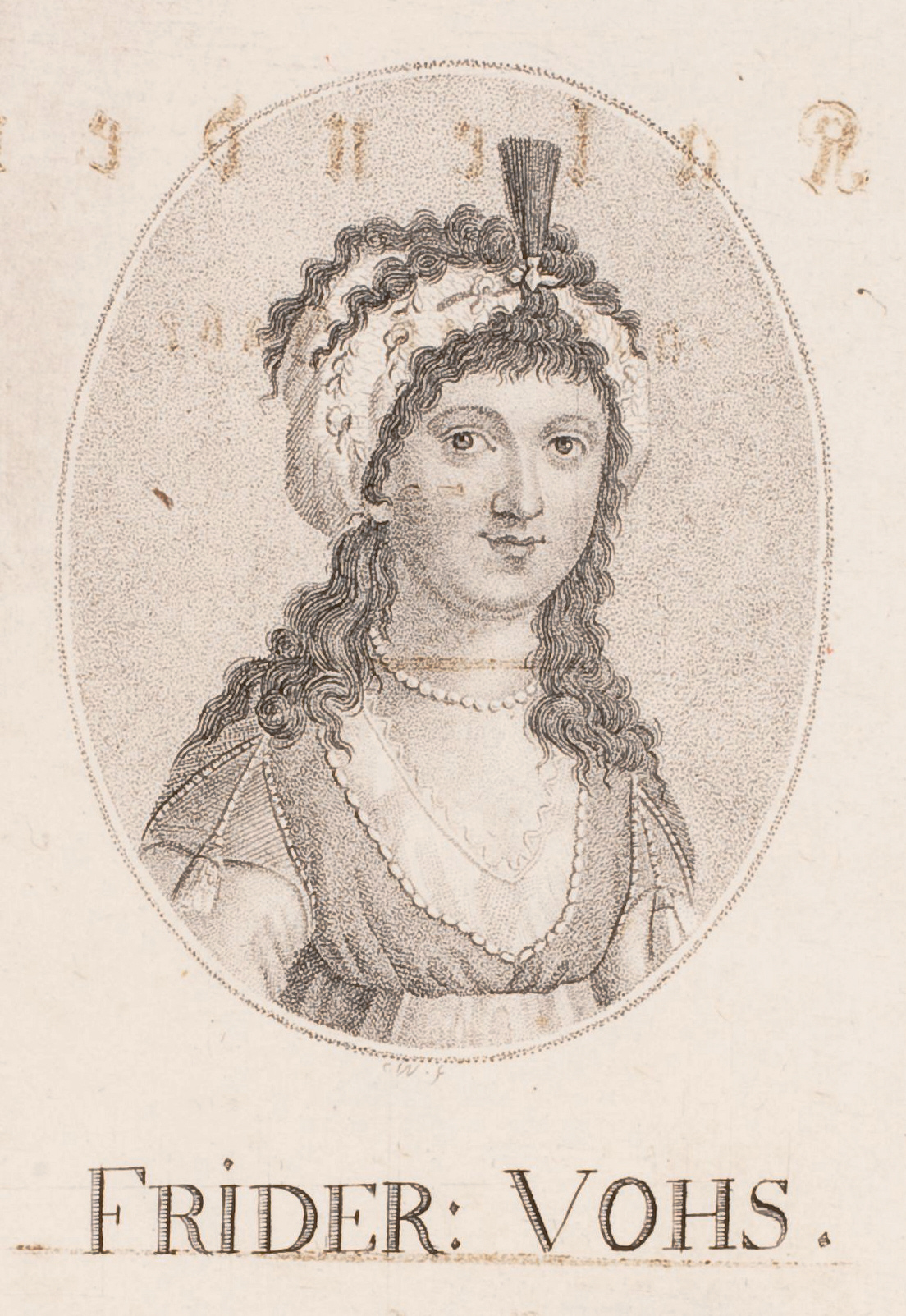 Bildnis Friederike Margarethe Vohs, geb. Porth, aus: Theater Kalender, Gotha, bei: Carl Wilhelm Ettlinger [Anf.19.Jh.] Punktierstich von Konrad Westermayr Wolfenbüttel, Herzog August Bibliothek, Inventar-Nr. A 22909 Herzog August Bibliothek Wolfenbüttel